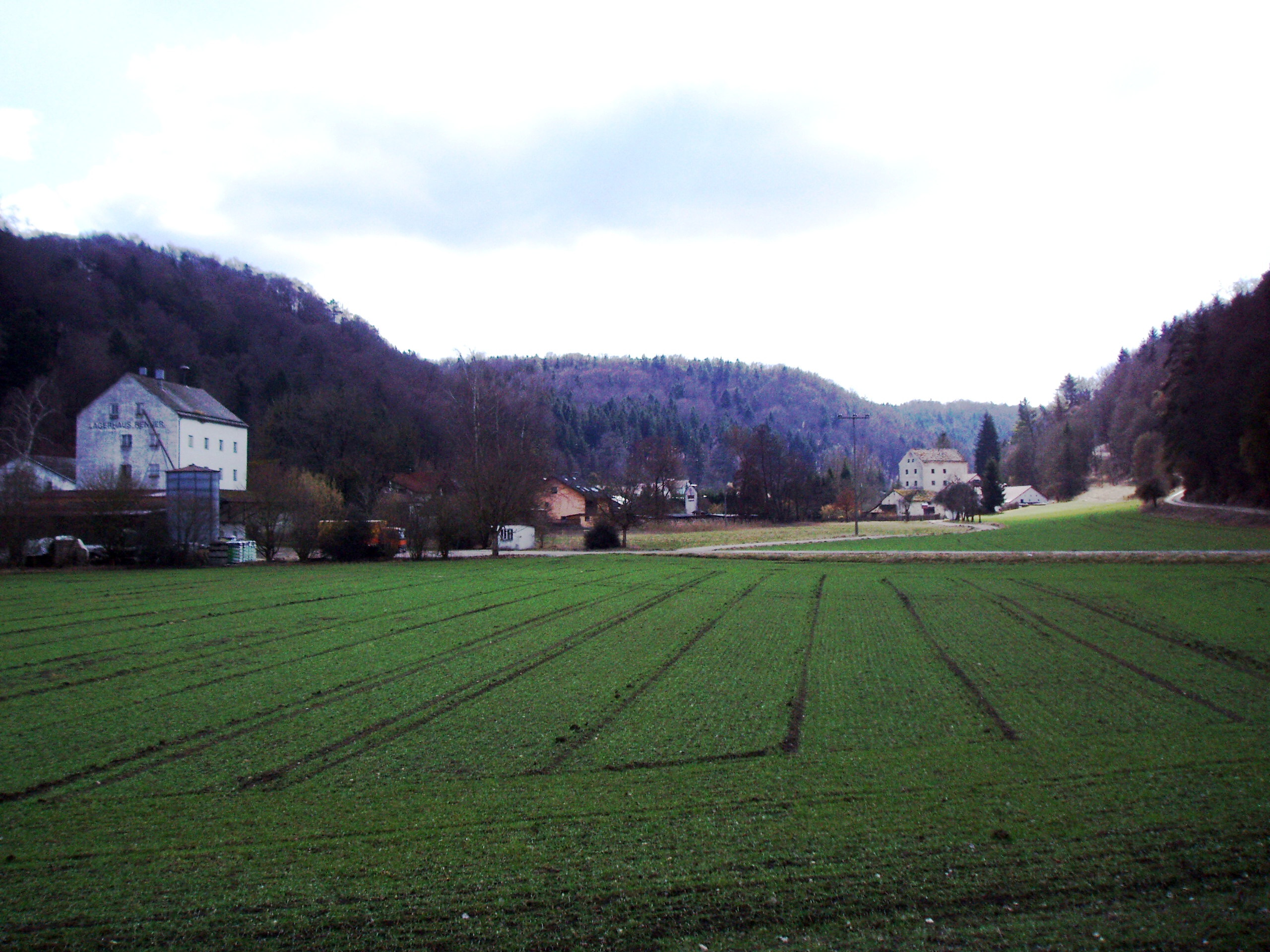 Schambachtal_bei_Arnsberg_im Landkreis Eichstätt mit_Mühlen